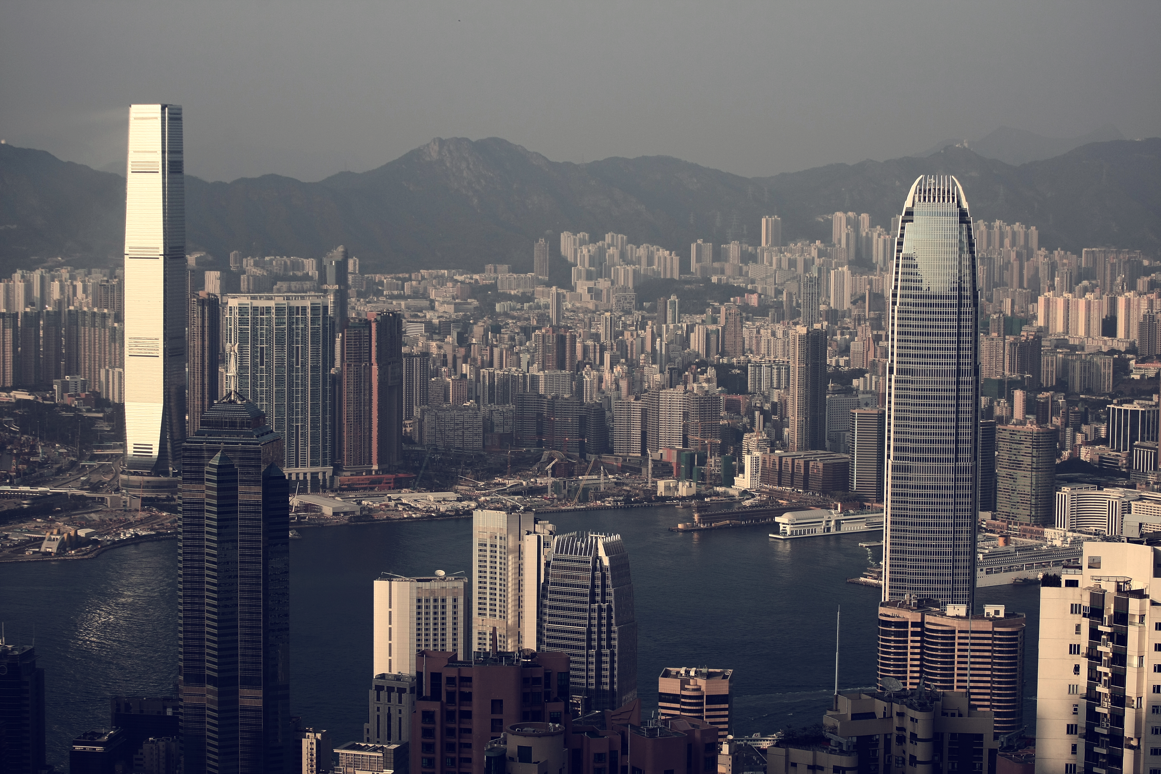 Victoria Harbor and The ICC Skyscraper (West Kowloon) and TWO IFC Skyscraper (Hong Kong Island). View from Victoria Peak. Hong Kong.